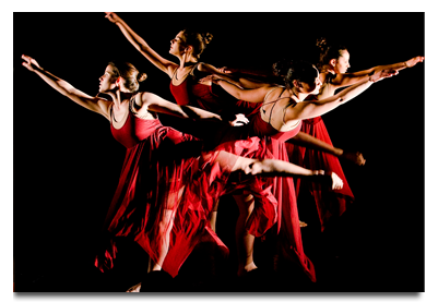 להקת גלים במחול בפעולה